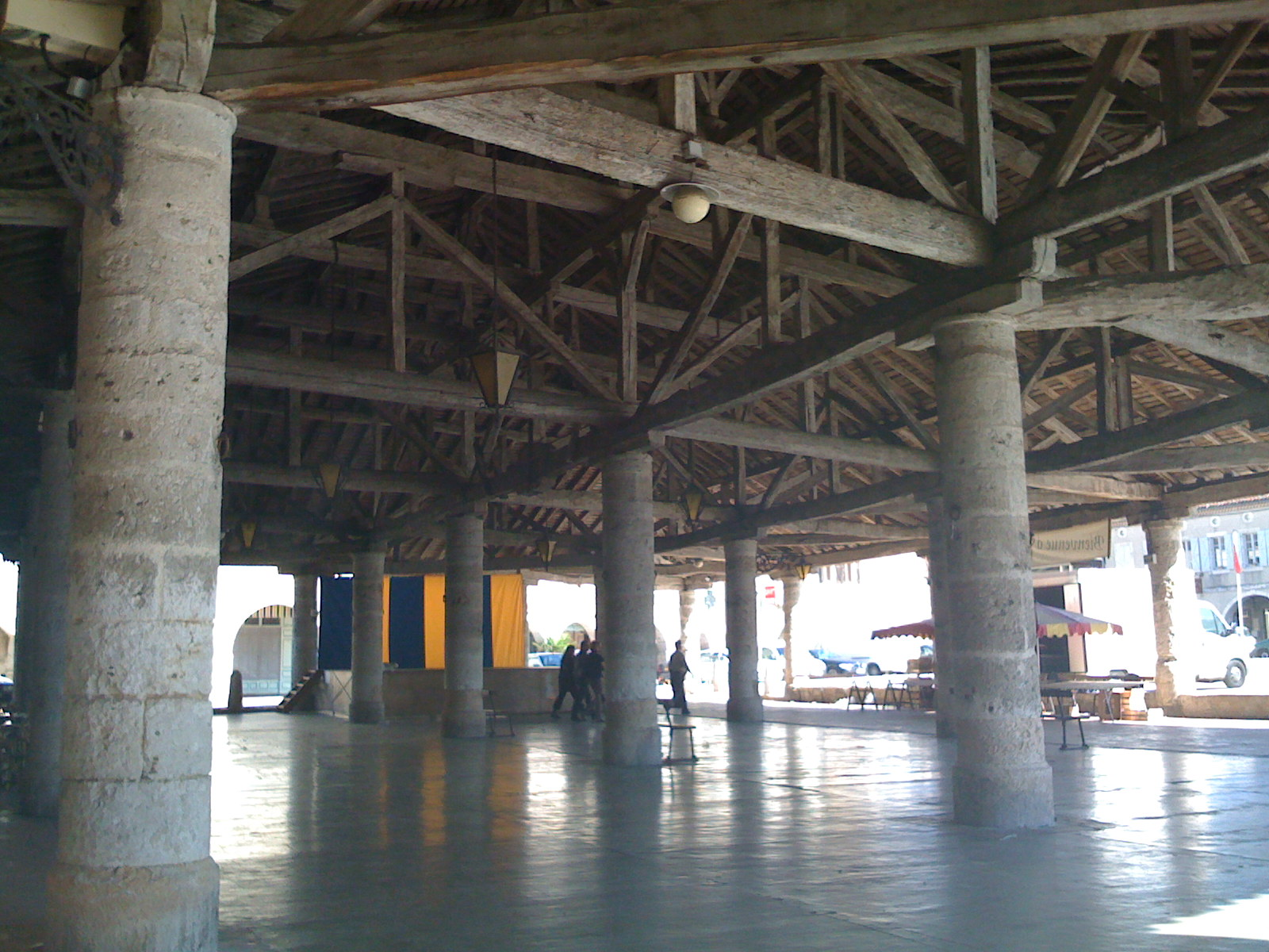 Halle de Mauvezin, Gers (charpente inscrite aux MH) .